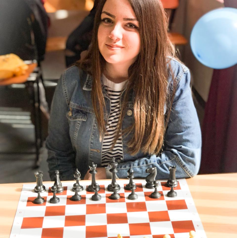 Салимова през 2018